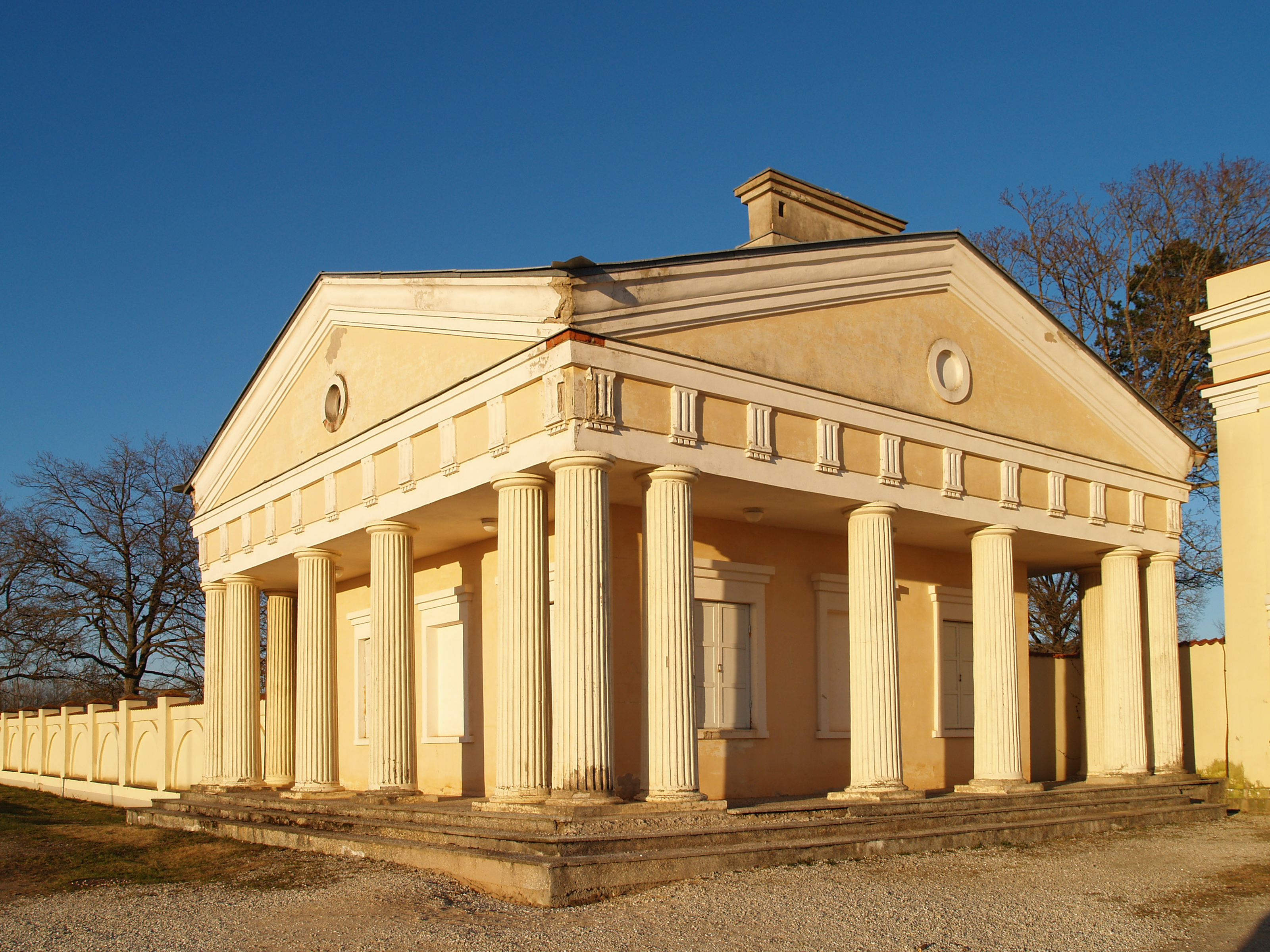 Raadi mõisa väravahoone